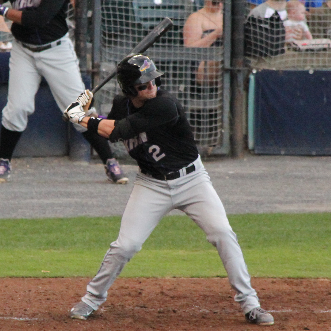 Tyler Holt